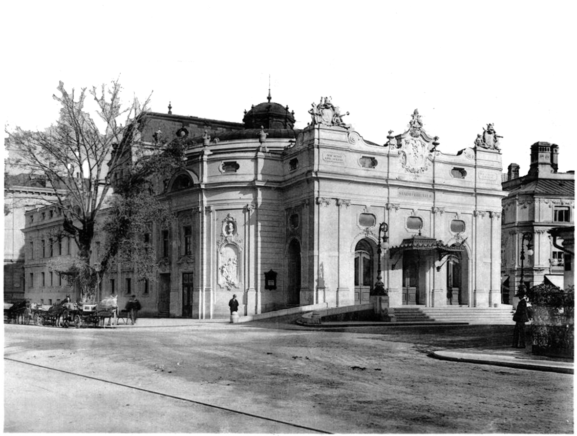 Salzburg-Stadt, Stadttheater, erbaut von Fellner und Helmer, 1892/93